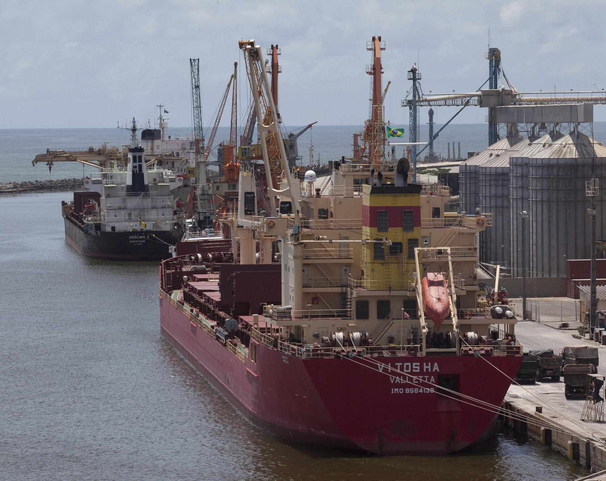 Estação do Metrô do Recife.